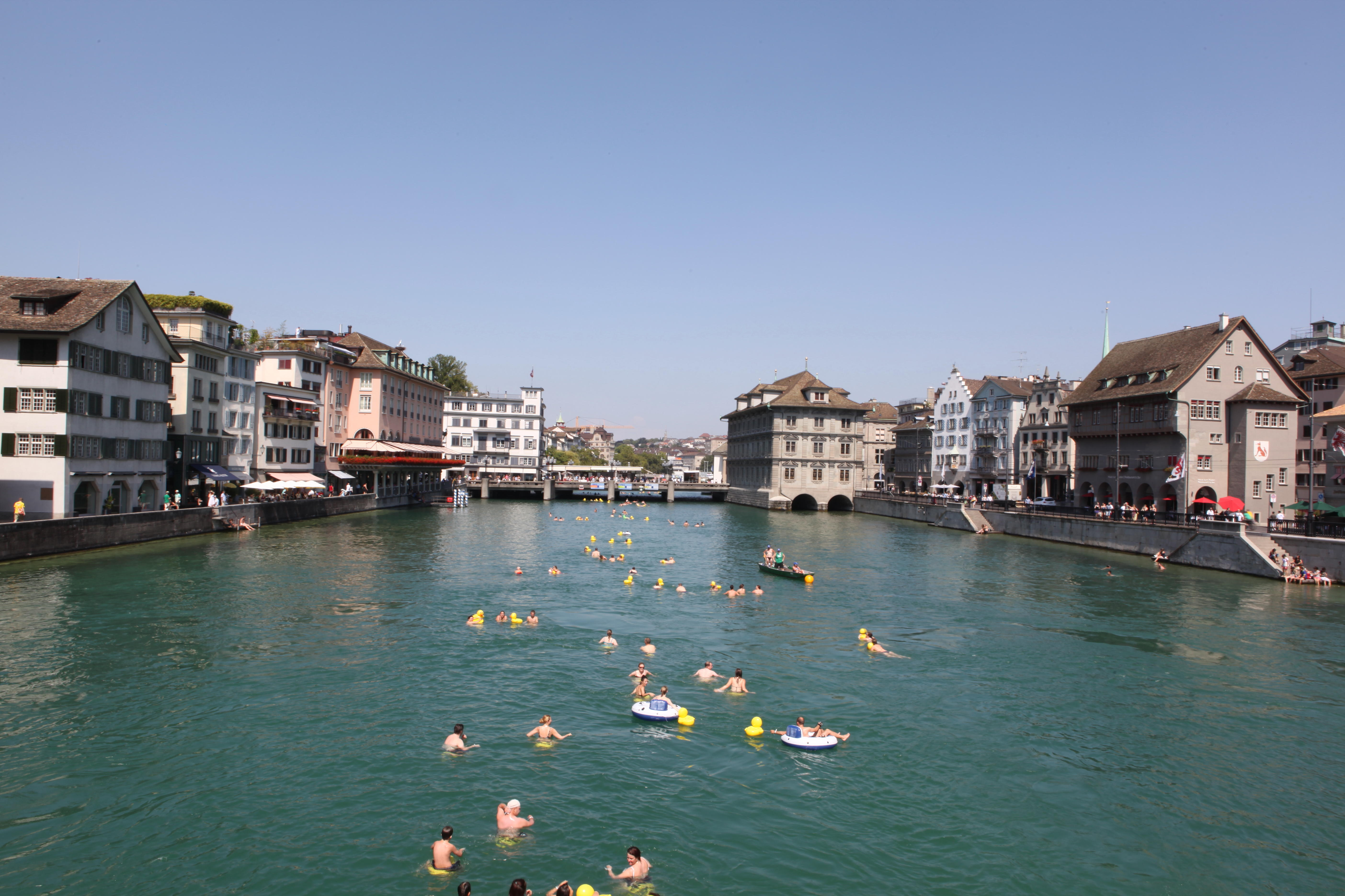 Limmatschwimmen 2011 in Zürich, Blickrichtung Rathausbrücke